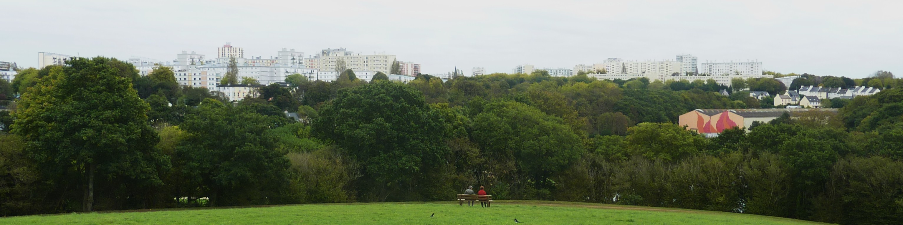 Brest : le quartier de Bellevue vu des abords du pont de la Villeneuve 1